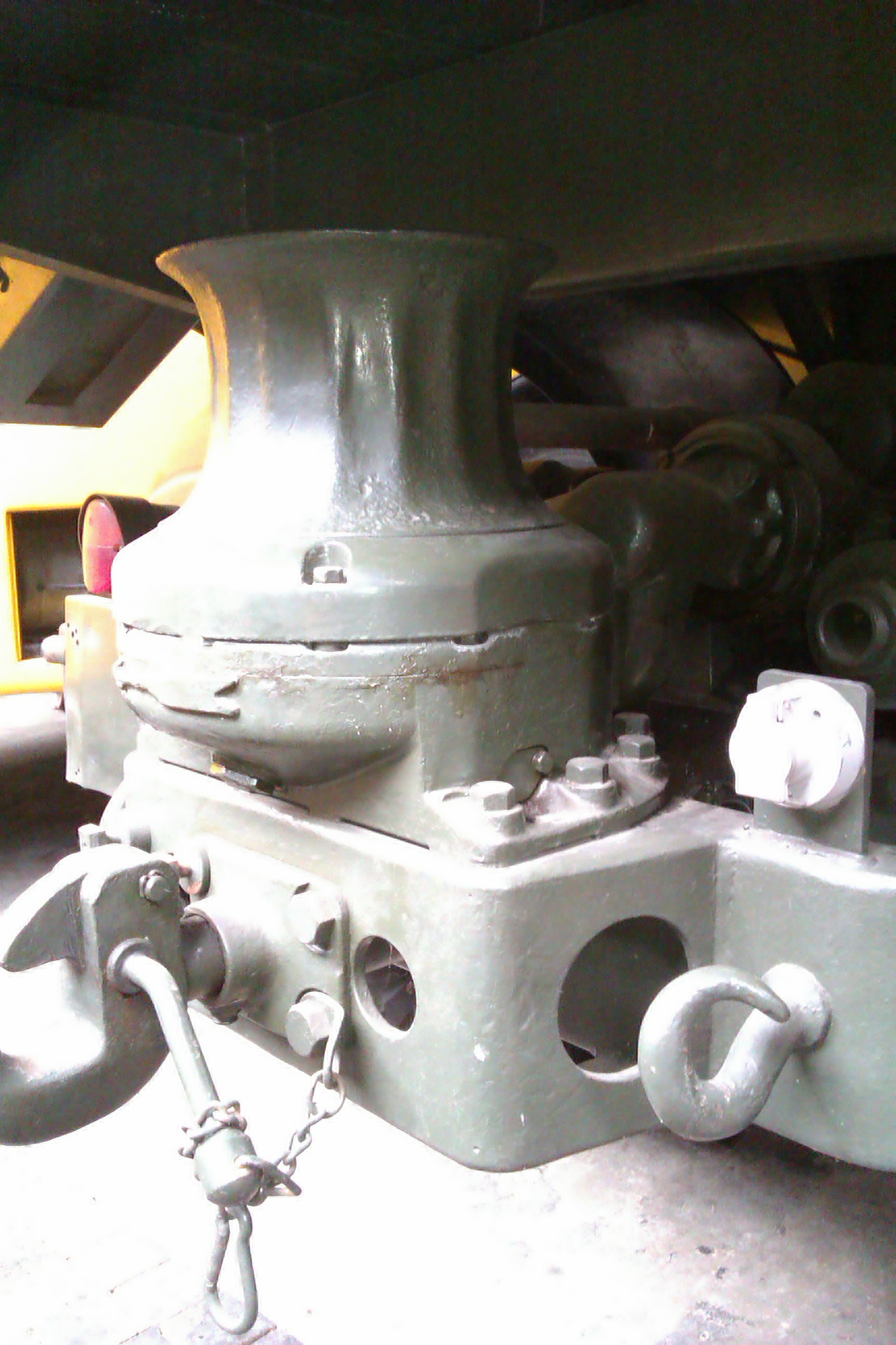 Spill an einem Lastwagen